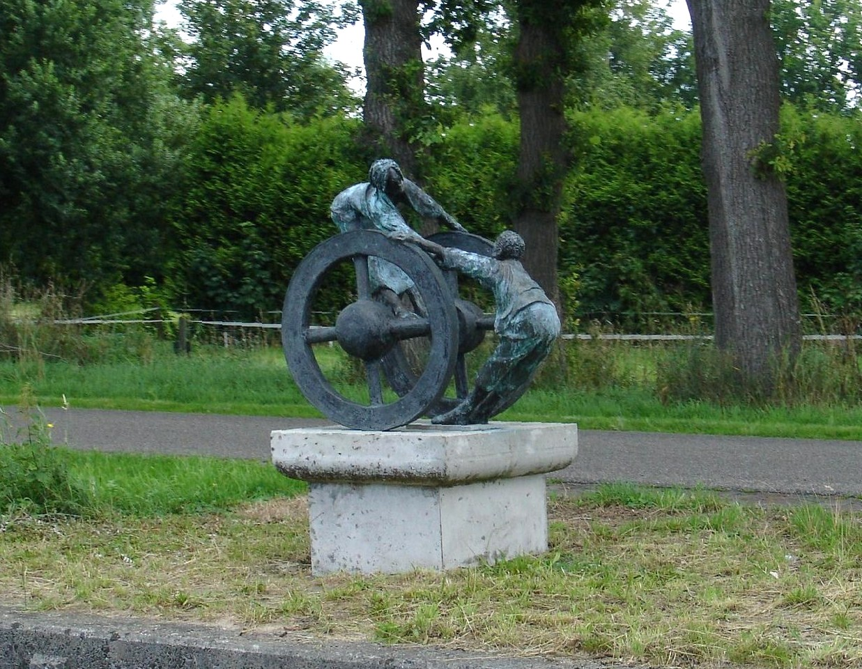 Ontmoeting, kunstwerk van Tine Mersmann in Hijkersmilde, Drenthe. 1999, brons